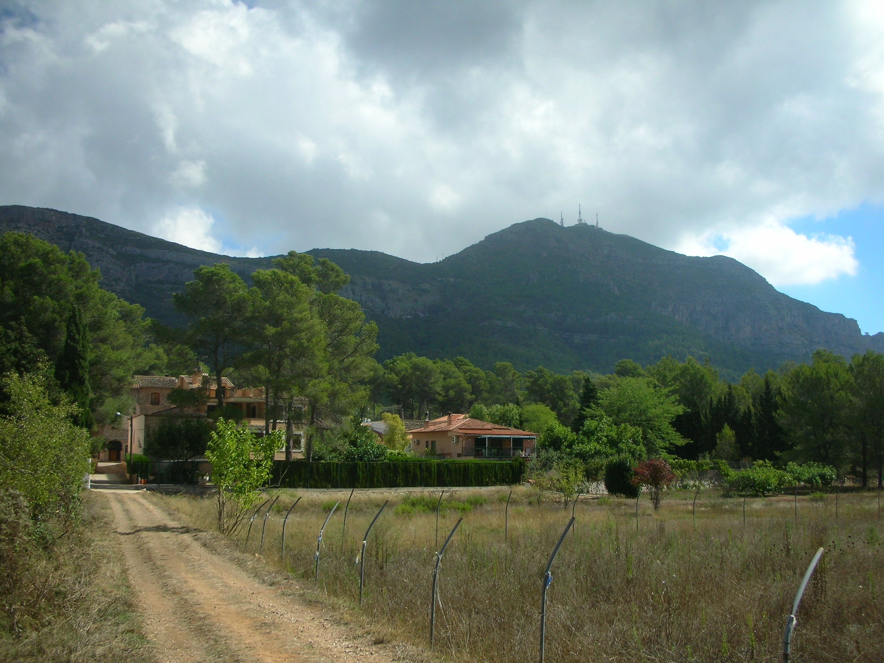 Vall de la Drova (Barx), amb el massís del Mondúber al fons